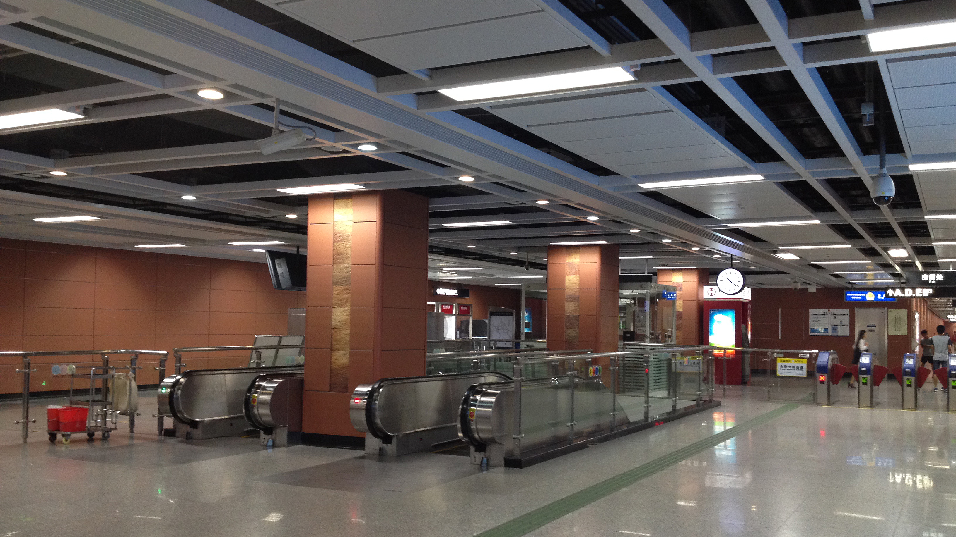 广佛地铁普君北路站站厅